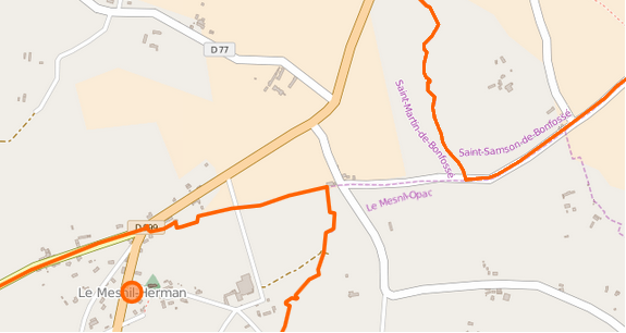 Bourgvallées - Frontière avec le Mesnil-Herman